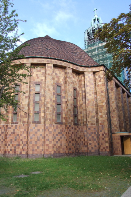 Martin-Luther-Gedächtniskirche Berlin-Mariendorf, Außenansicht Fotograf: Harald Rossa Datum: September 2006 Höher aufgelöste Version ist verfügbar